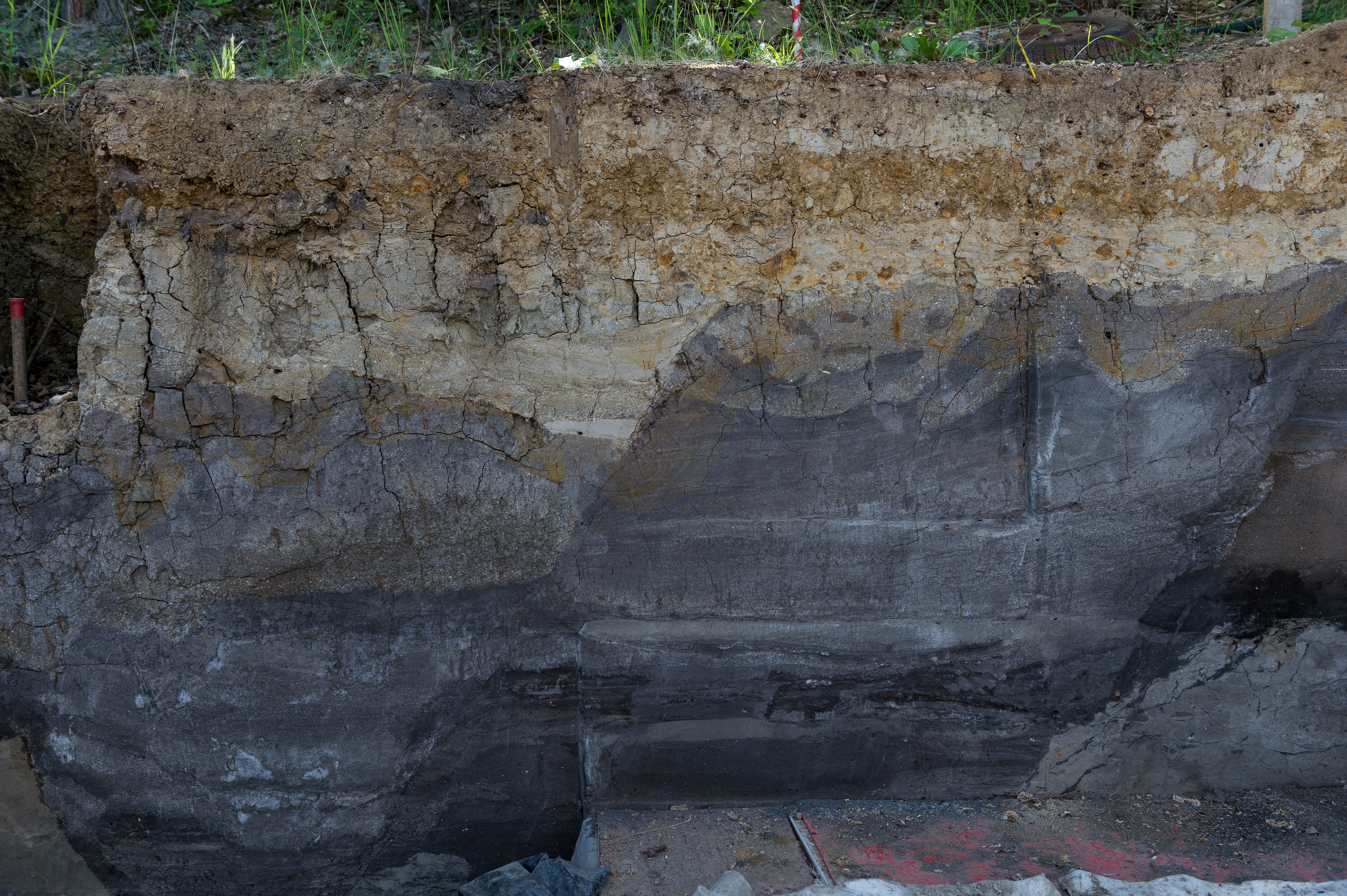 Schöningen 13 II Obere Berme (Speerhorizont Süd) - Profil.